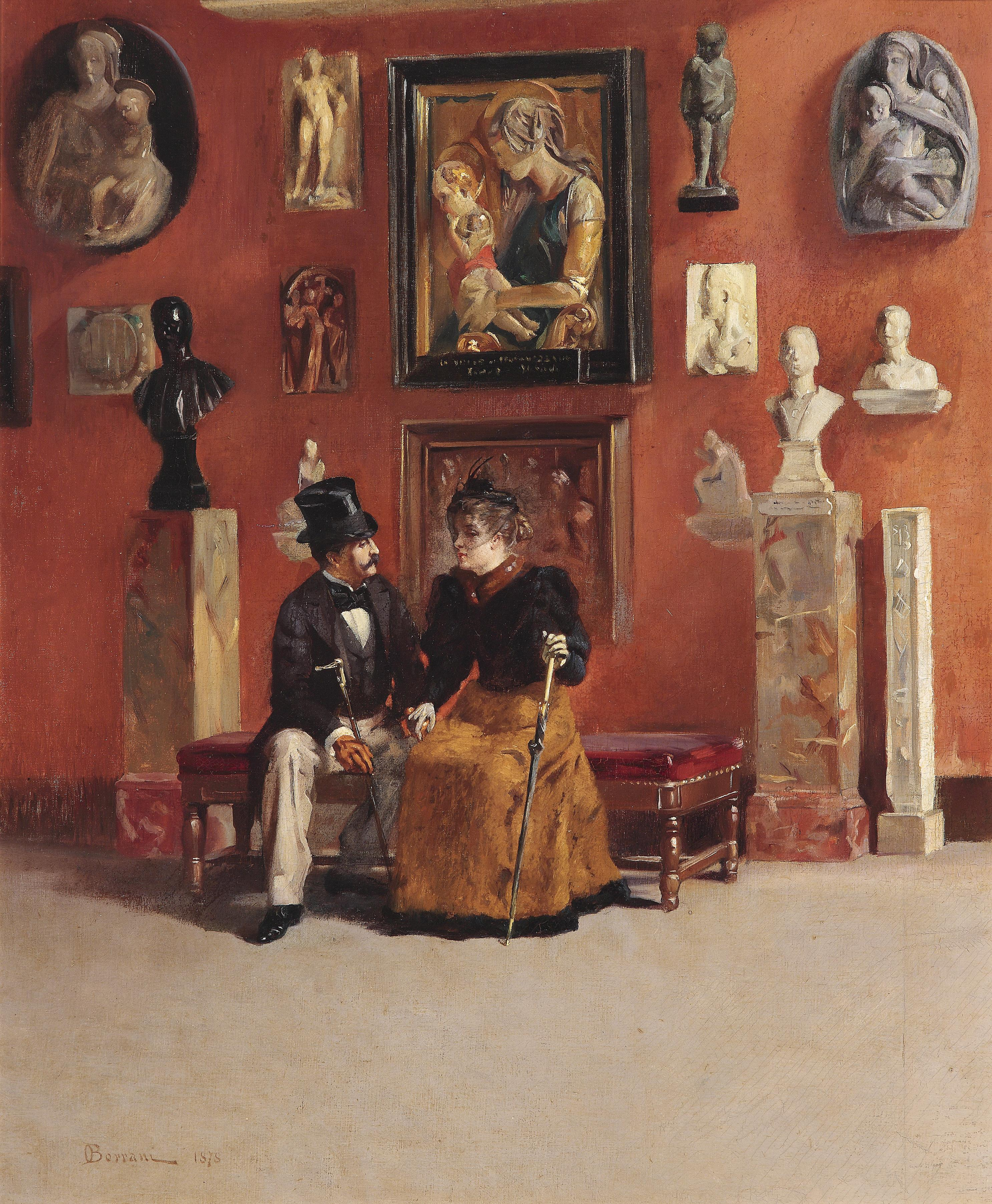 Rendezvous in den Uffizien, signiert, datiert O. Borrani (ligiert) 1878, Öl auf Leinwand, 63 x 51,2 cm